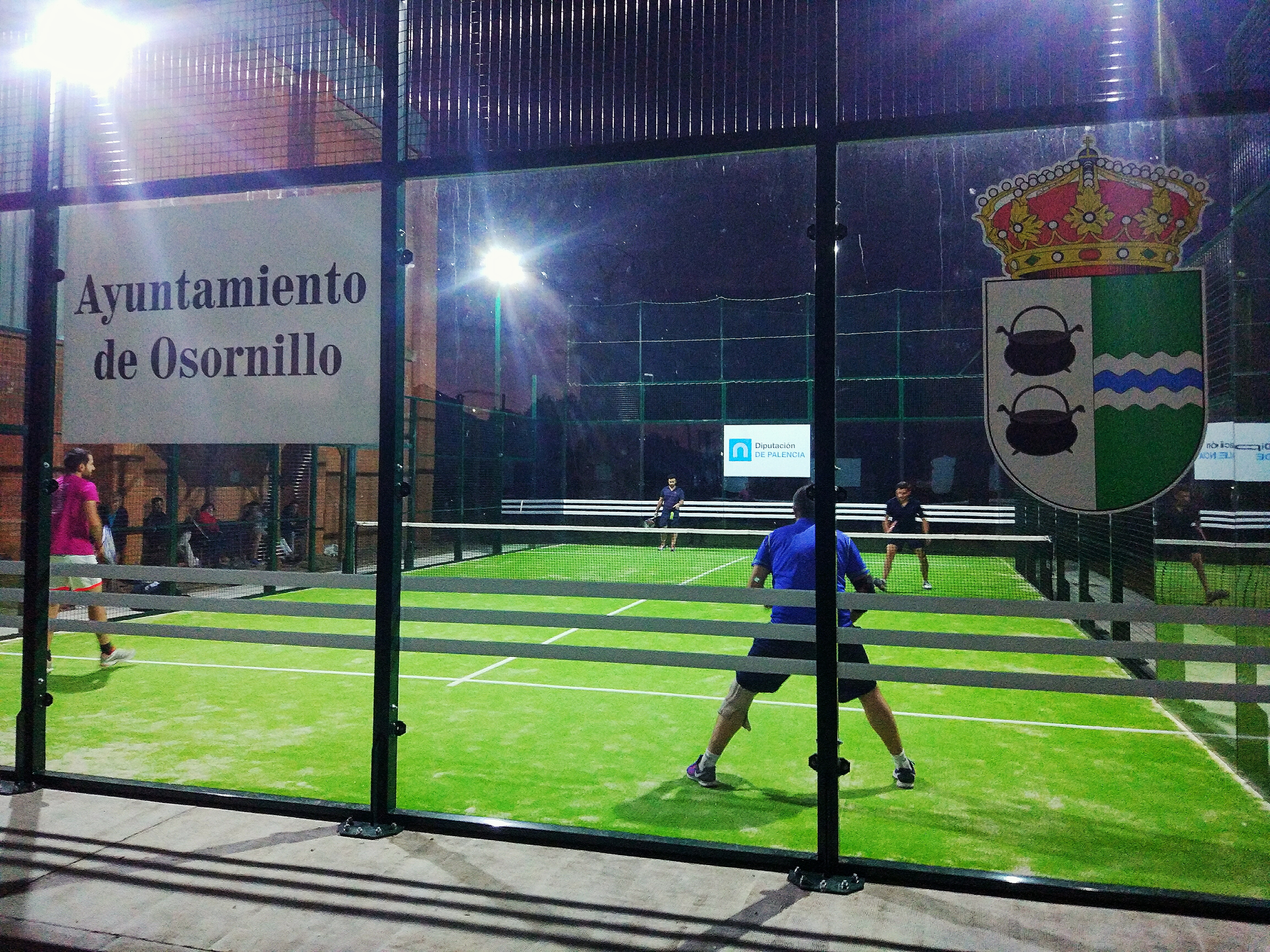 Pista de pádel de Osornillo (Palencia)